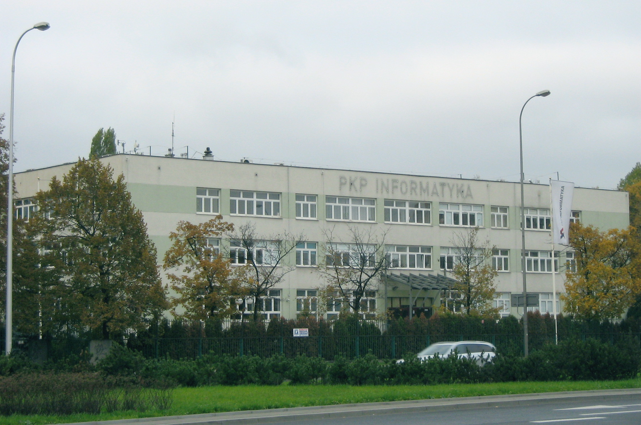 Aleje Jerozolimskie 140 w Warszawie, stara siedziba PKP Informatyka, jesień 2015